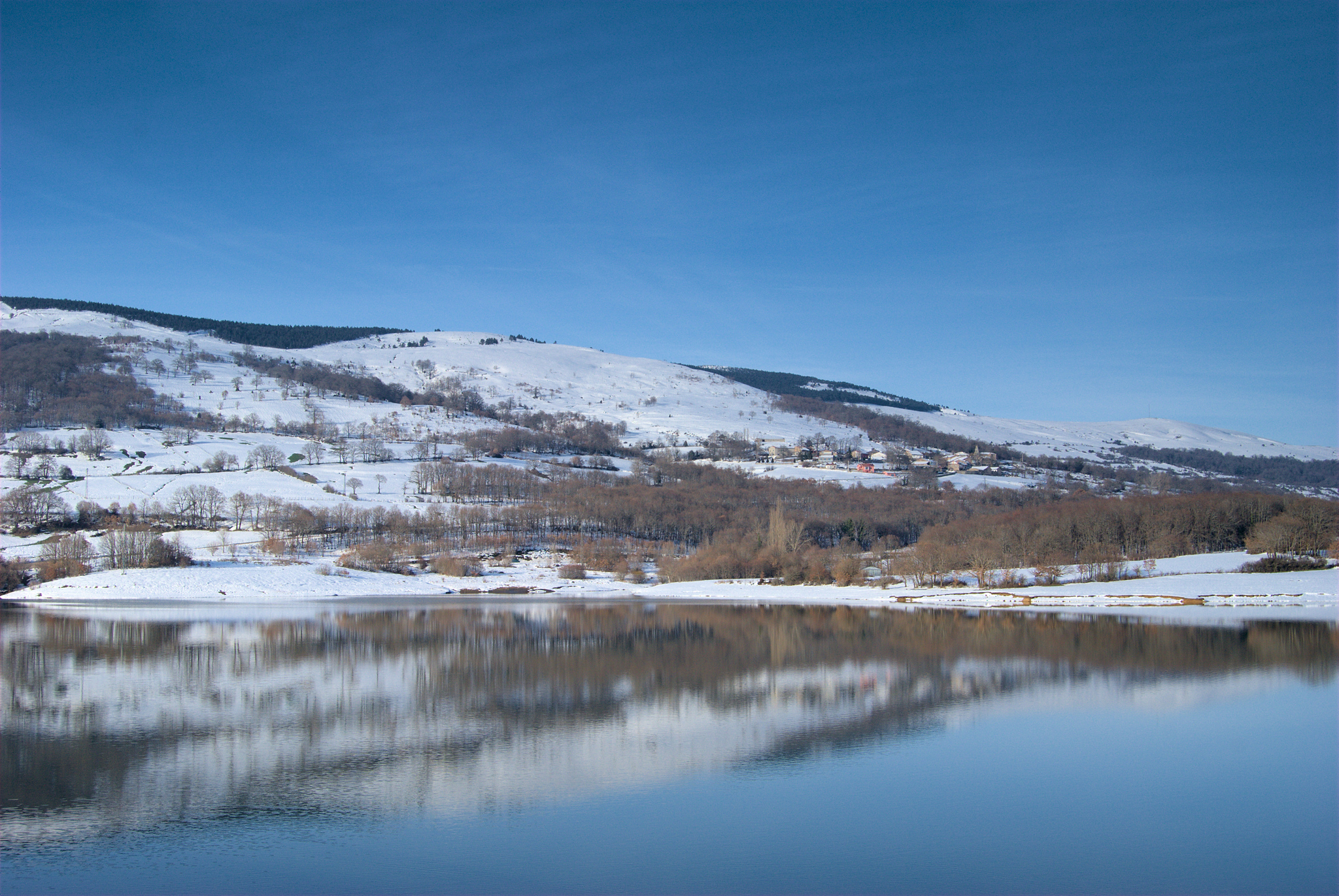 Embalse del Ebro-Monte Hijedo This is a photography of a Site of Community Importance in Spain with the ID: ES4120090. Natura2000 entry, EEA entry